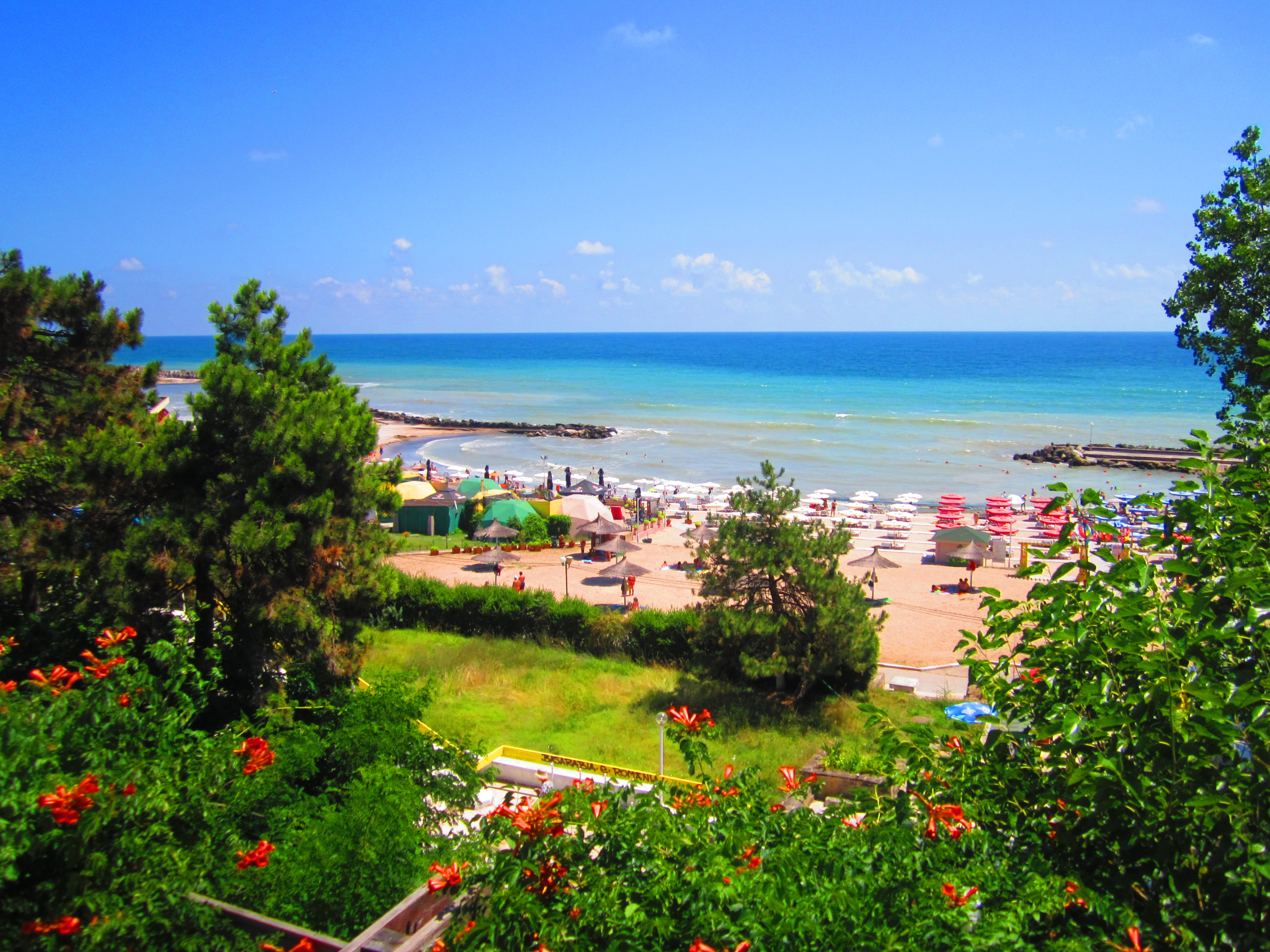 Vedere catre Marea Neagra /Black Sea View